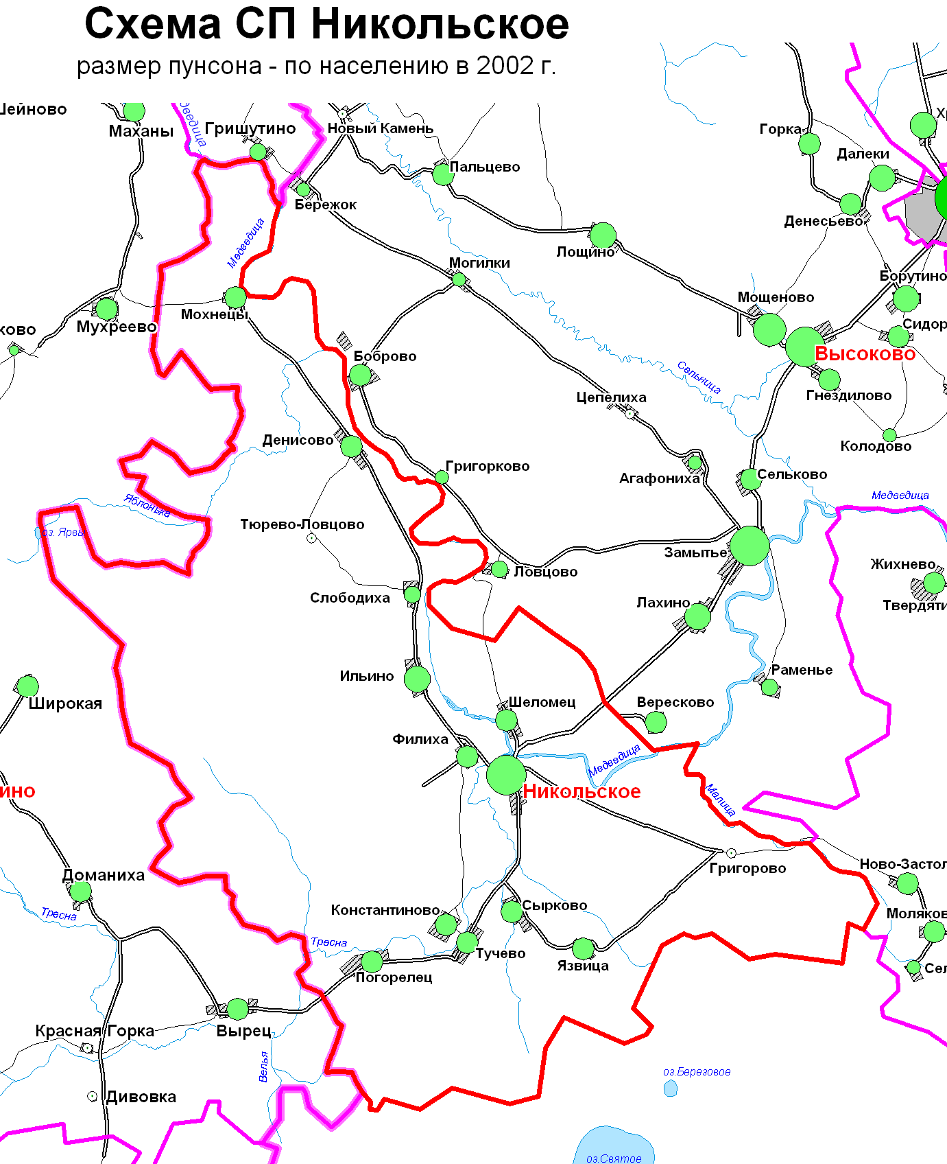 Схеме сп Никольское